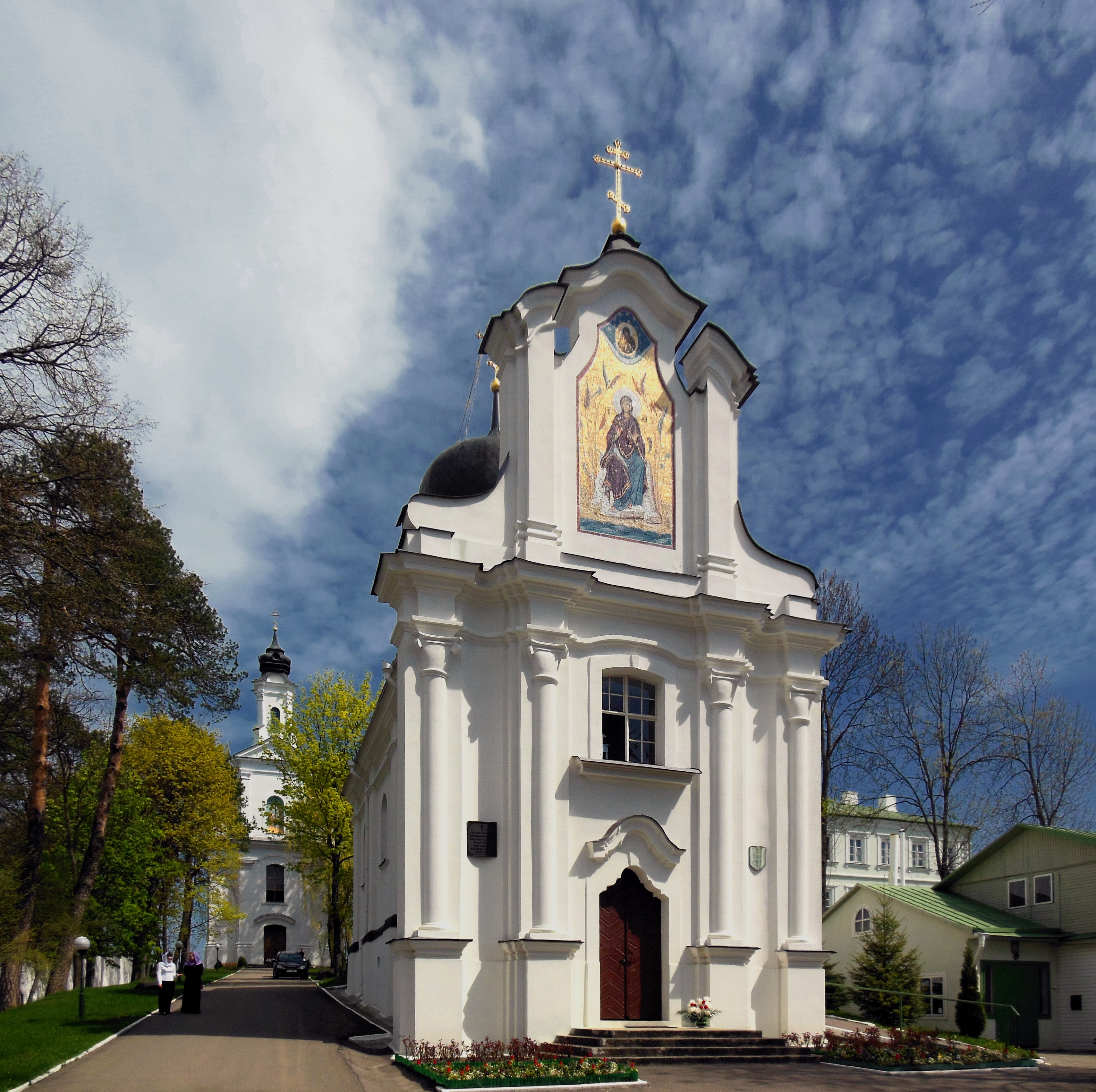 Беларуская (тарашкевіца): Ансамбаль Сьвята-Усьпенскага манастыра: Усьпенскі сабор дэкаратыўнае аздабленьне: росьпіс у консе «Спас Пантакратар», арнамэнтальны дэкор на скляпеньнях паўднёвай сакрысьціі і ўсіх нэфаў, іканастас, бакавыя алтары Богаяўленская царква Крыжаўзьвіжанская царква званіца будынак сэмінарыі жылы корпус гаспадарчыя пабудовы. в. Жыровічы This is a photo of Belarusian heritage monument. Reference number: 411Г000537 ( WLM)